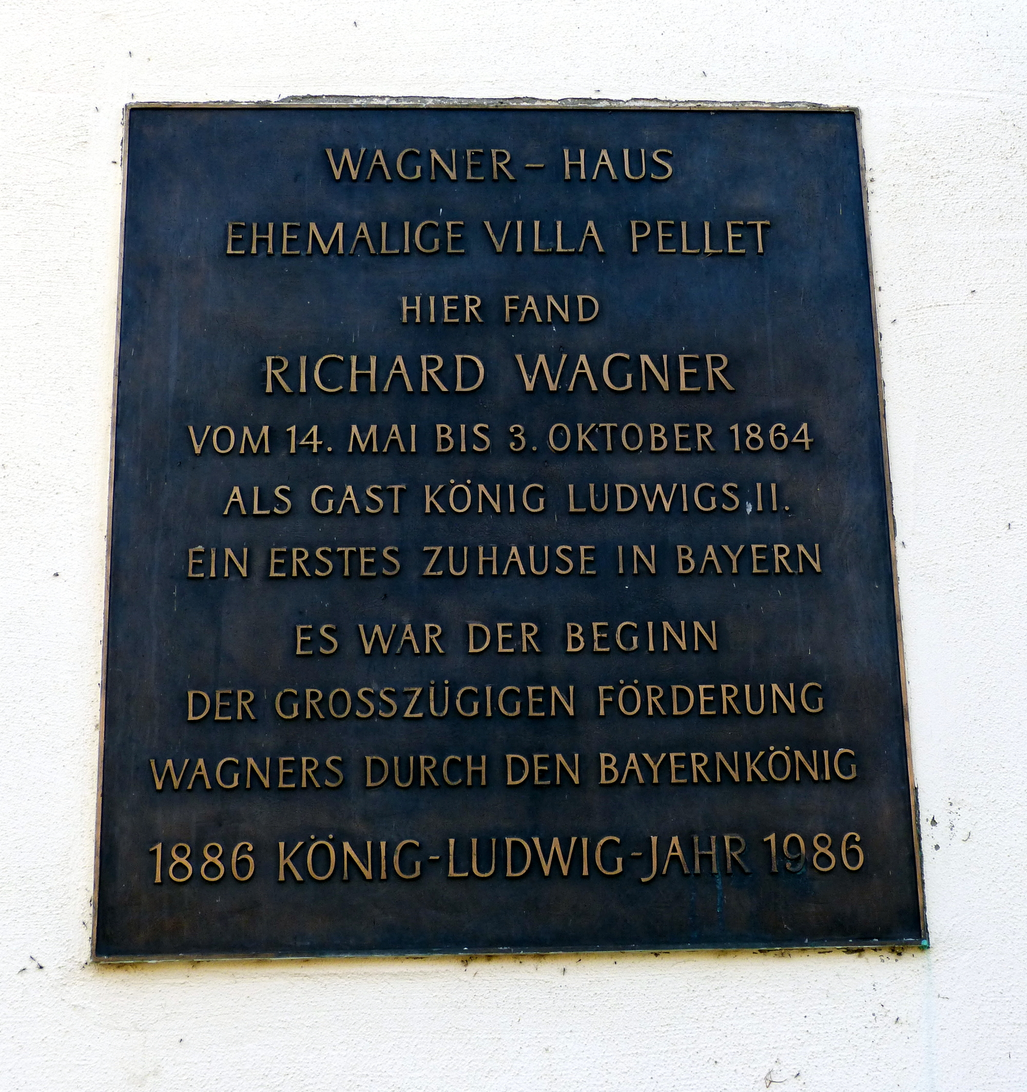 Berg am Starnberger See, OT Kempfenhausen, Münchner Straße 57. Villa Pellet, Hinweistafel auf den dortigen Aufenthalt des Komponisten Richard Wagner.